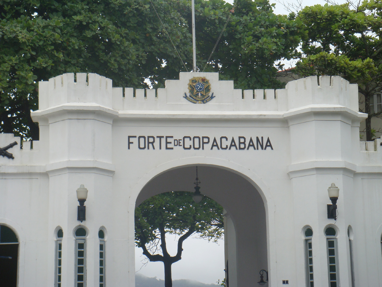 Outer entrance of Copacabana Fort, Rio de Janeiro, Brazil